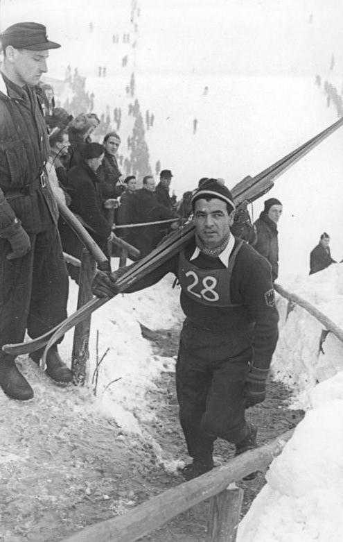 Zentralbild Quasch. 16.2.1953 IV. Wintersportmeisterschaften der Deutschen Demokratischen Republik für Frieden, Einheit, Demokratie und Sozialismus vom 10. - 15.2.1953 in Oberhof Sondersprunglauf auf der Thüringen-Schanze UBz: Sepp Weiler aus Oberstdorf auf dem Weg zur Schanze.